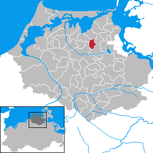 Kummerow in Mecklenburg-Vorpommern - District Nordvorpommern